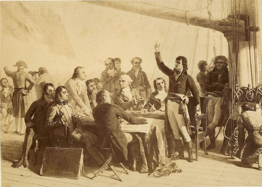 Napoléon Bonaparte sur le pont de l’Orient discutant avec les savants en route pour l'expédition d’Égypte. Dessin d'après un tableau anglais du XIXème siècle sans date précise, probablement sous le Second Empire. NB : erreur dans le titre du doc. Il s'agit de l’Orient, pas de l’Océan.